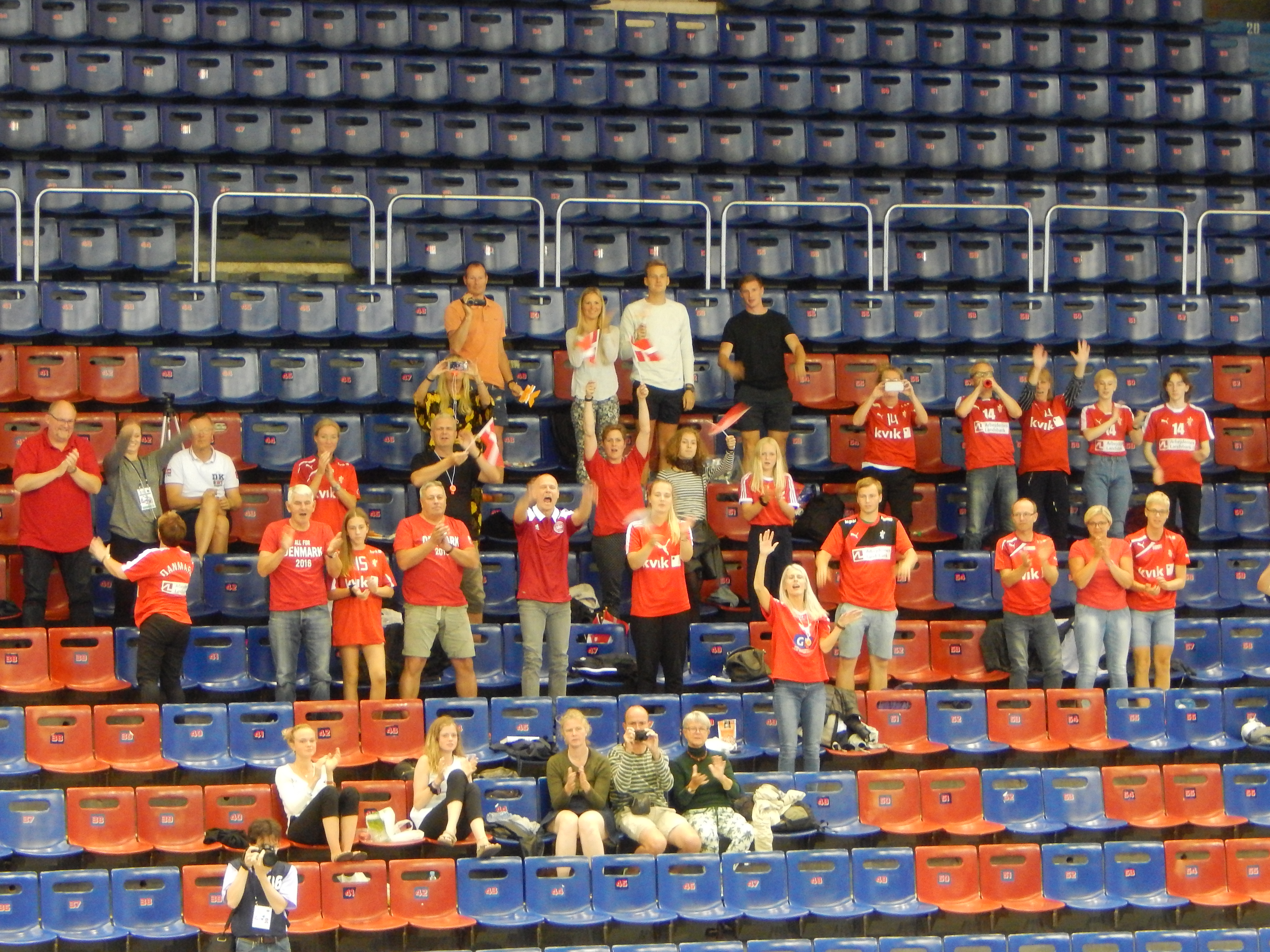 Чемпионат мира по гандболу среди девушек до 20 лет. Групповой этап, группа A. Матч Черногория - Дания